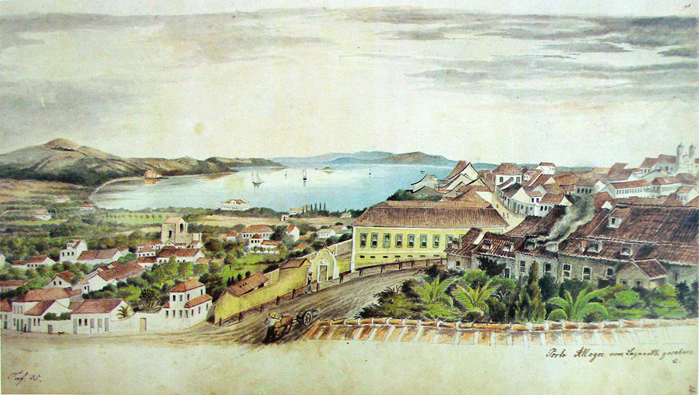 Herrmann Wendroth: Porto Alegre vista do alto da Misericórdia em direção ao sul, c. 1852. Aquarela.